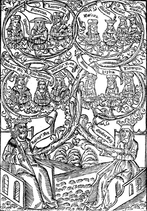 Беларуская (тарашкевіца): Радавод вялікага князя літоўскага Казімера Ягайлавіча (Kazimier Jagajłavič)